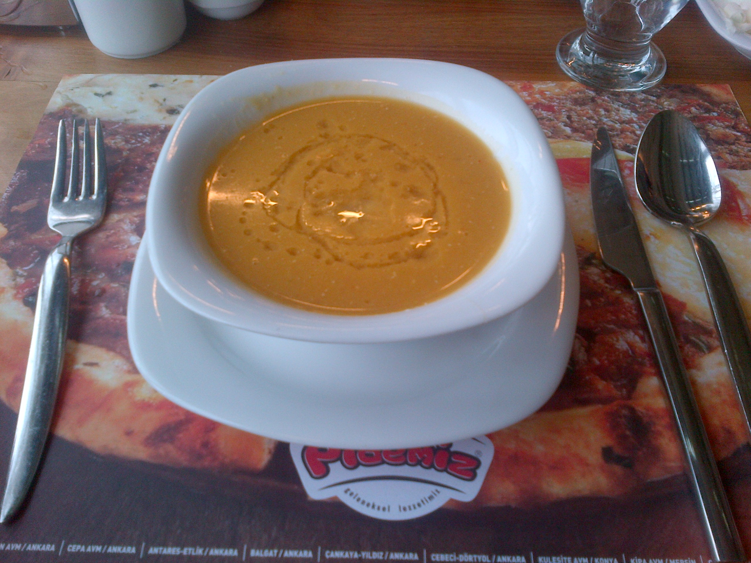 Crema de lentejas rojas, o "mercimek çorbası", de la cocina turca.